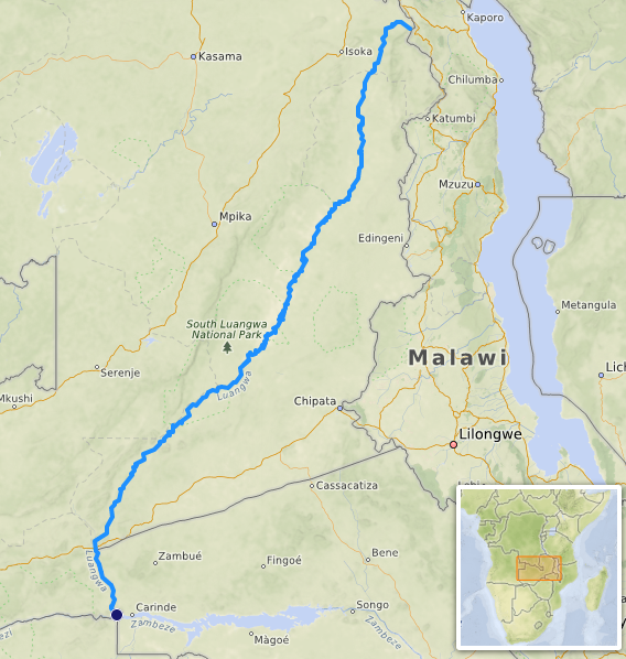 carte réalisée sur umap [1] This map may be incomplete, and may contain errors. Don't rely solely on it for navigation.